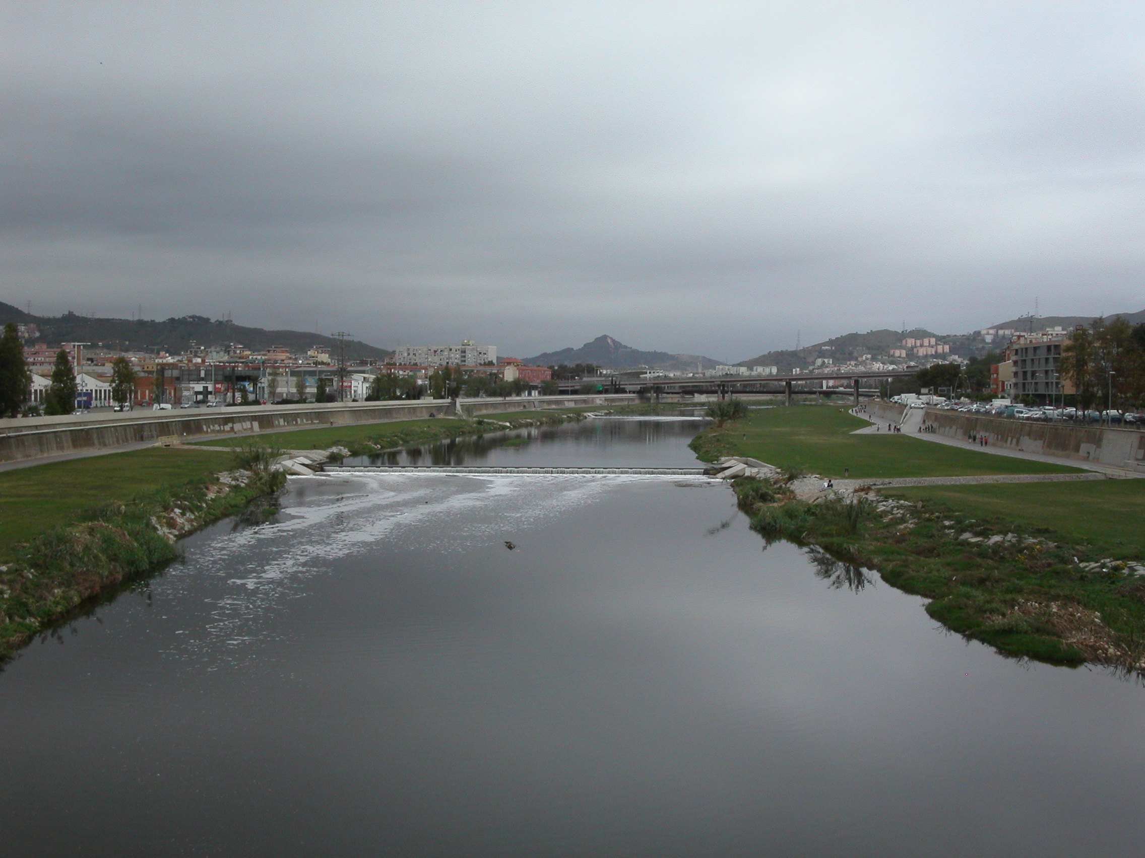 Vista del Rio Besós desde el puente más antiguo de Sant Adrià de Besòs.